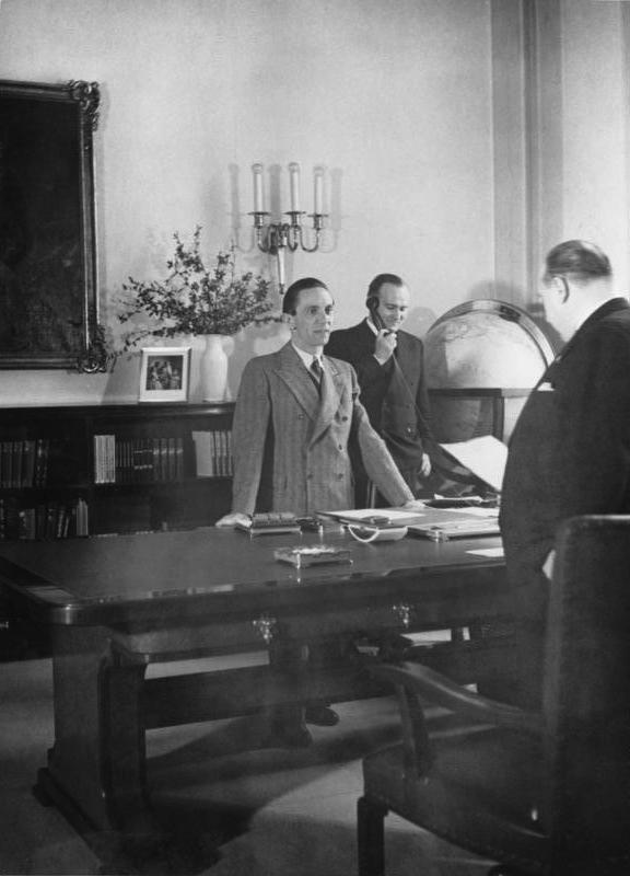 Zentralbild / Reichsminister Dr. Josef Goebbels. Dr. Joseph Goebbels, Reichsminister für Volksaufklärung und Propaganda bei einer Besprechung mit seinem Staatssekretär Walter Funk in seinem Arbeitszimmer im Ministerium. Im Hintergrund der persönliche Referent des Ministers Karl Hanke. (Aufnahme 1937) 13271-37 Abgebildete Personen: Goebbels, Joseph: Reichsminister für Volksaufklärung und Propaganda, Gauleiter Berlin, Deutschland Hanke, Karl: Staatssekretär, Gauleiter und Oberpräsident von Niederschlesien, Deutschland (GND 130339490) Funk, Walter Dr.: Reichswirtschaftsminister, Reichsbankpräsident, Deutschland